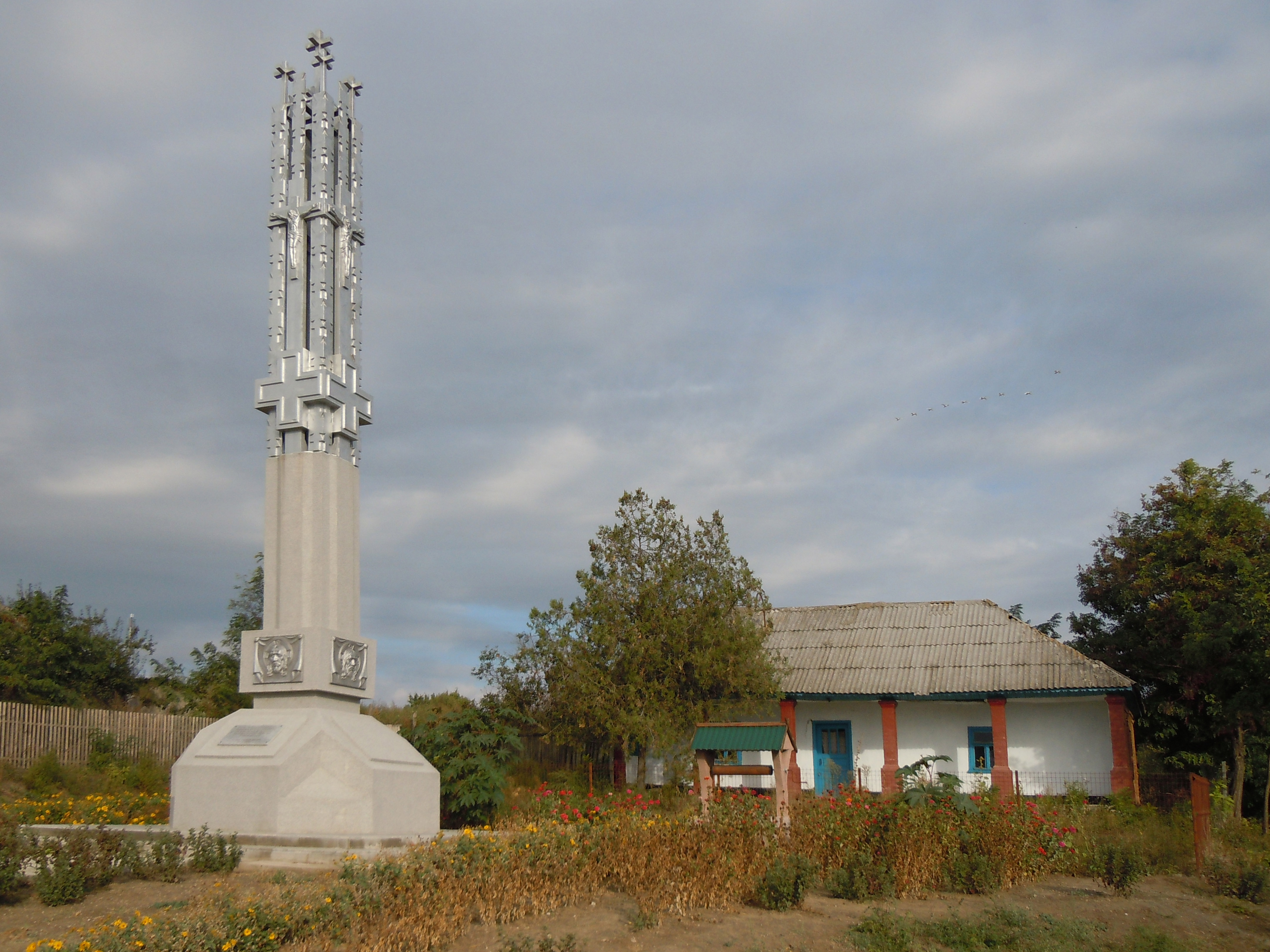 Пам'ятник у селі Орлівка, Ренійський район, Одеська область